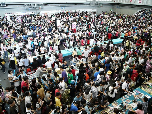 在逢甲大學體育館3樓主球場舉行的第4屆Grand Journey同人誌展售會(GJ4)。